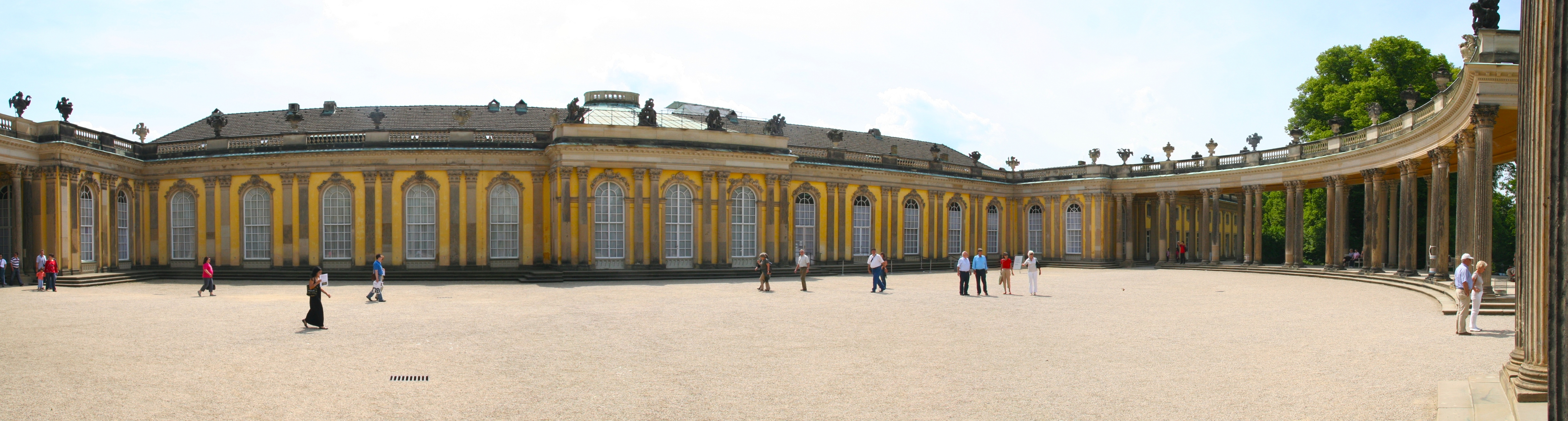 Chateau Sanssouci, Potsdam